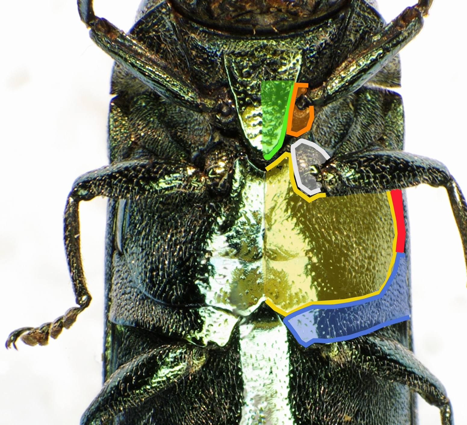 Brustabschnitt von Coraebus florentinus von unten, rechte Seite teilweise koleriert grün: Prosternalfortsatz orange/grau/blau: Prae/Meso/Metacoxa gelb: Metasternum rot:Metaepisternum